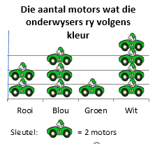 ŉ Piktogram bestaan uit prentjies of simbole.